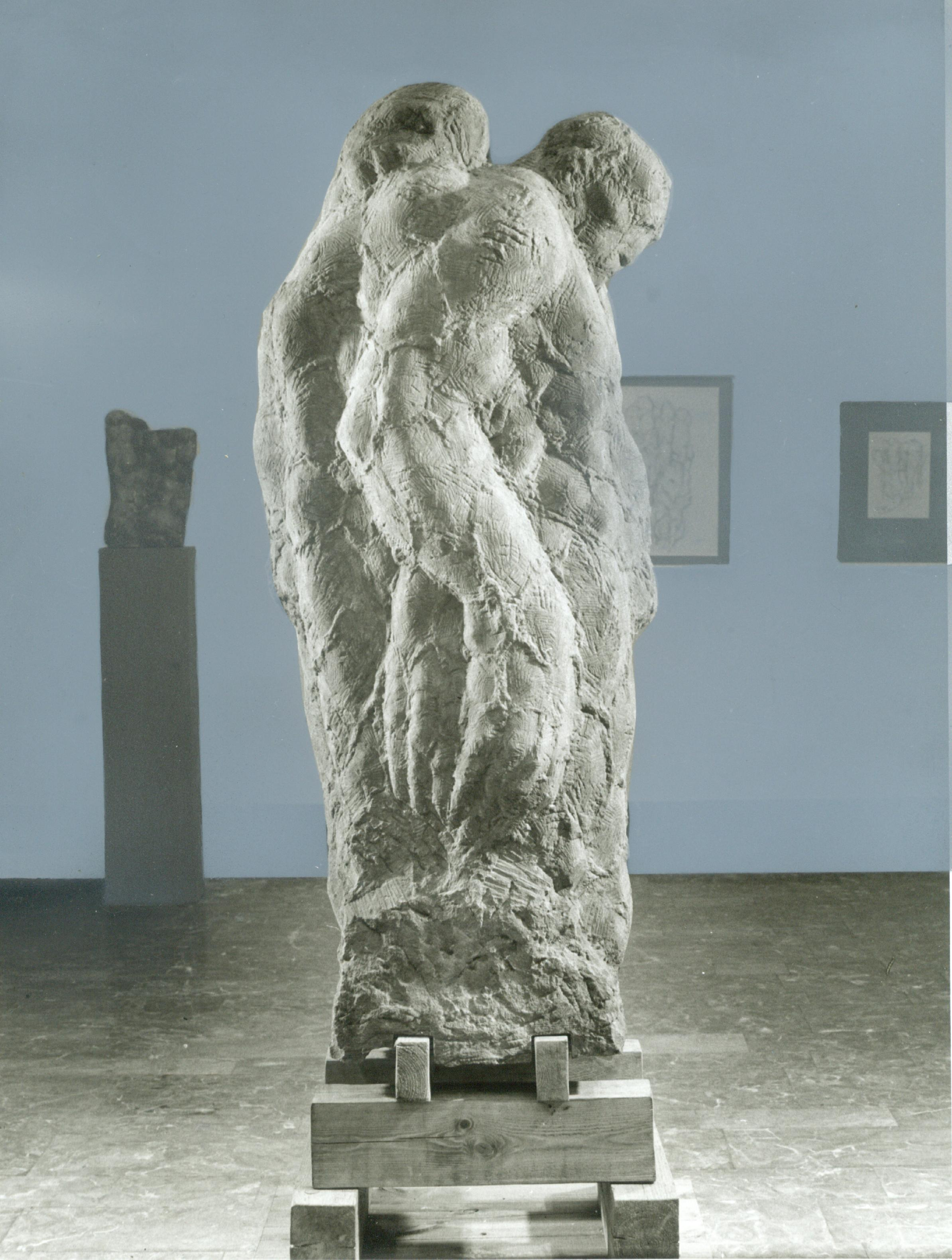 Sandstein 1975 - 1979, Höhe 150cm